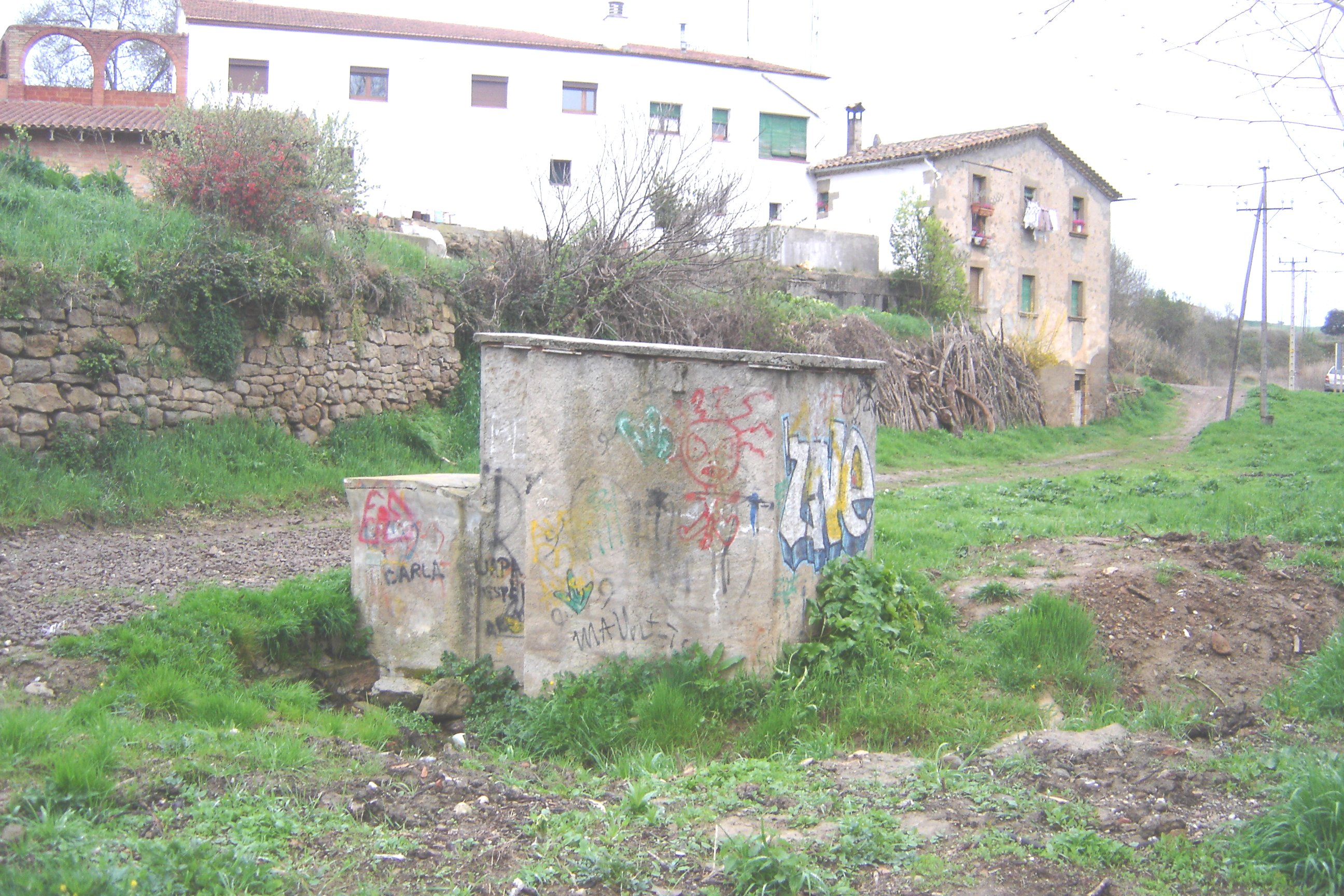 La font i i la casa del Molí dels Capellans, a Solsona (Solsonès)